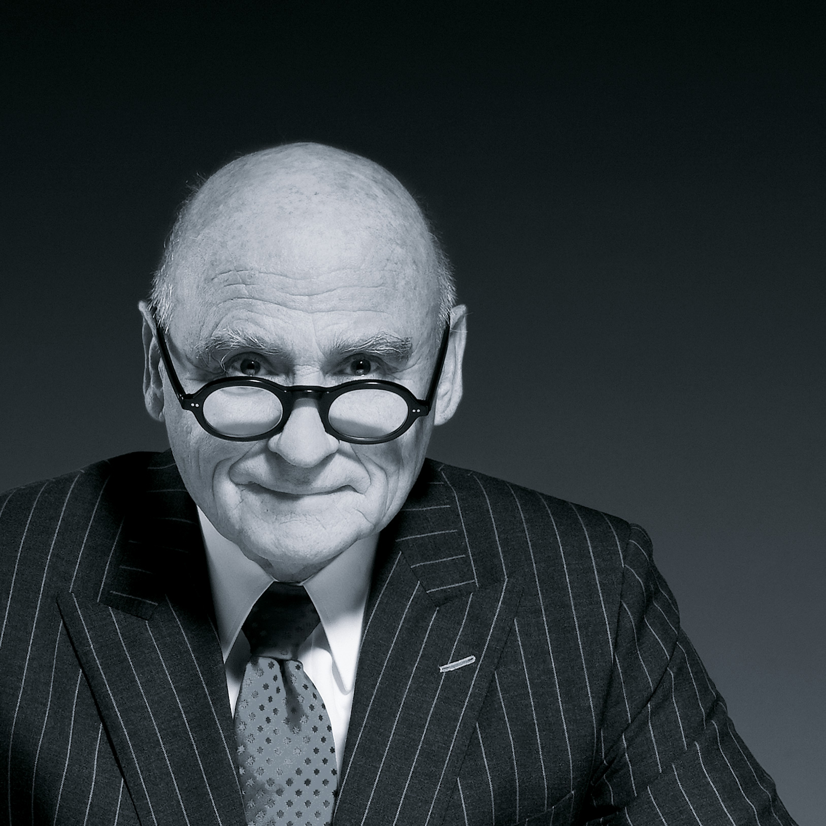 Dieter Sieger, 2013